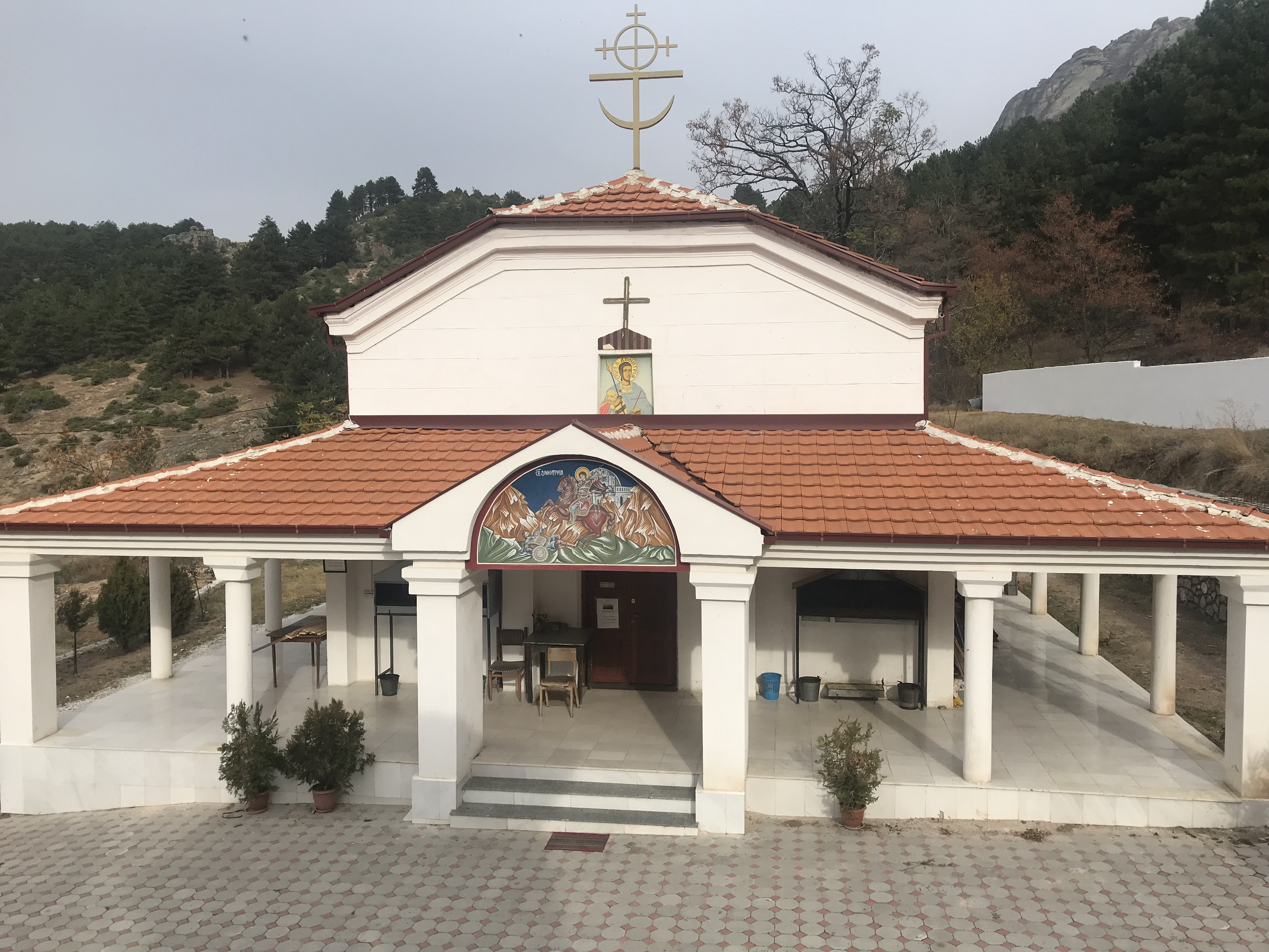 Црквата „Св. Димитрија“ во Селце